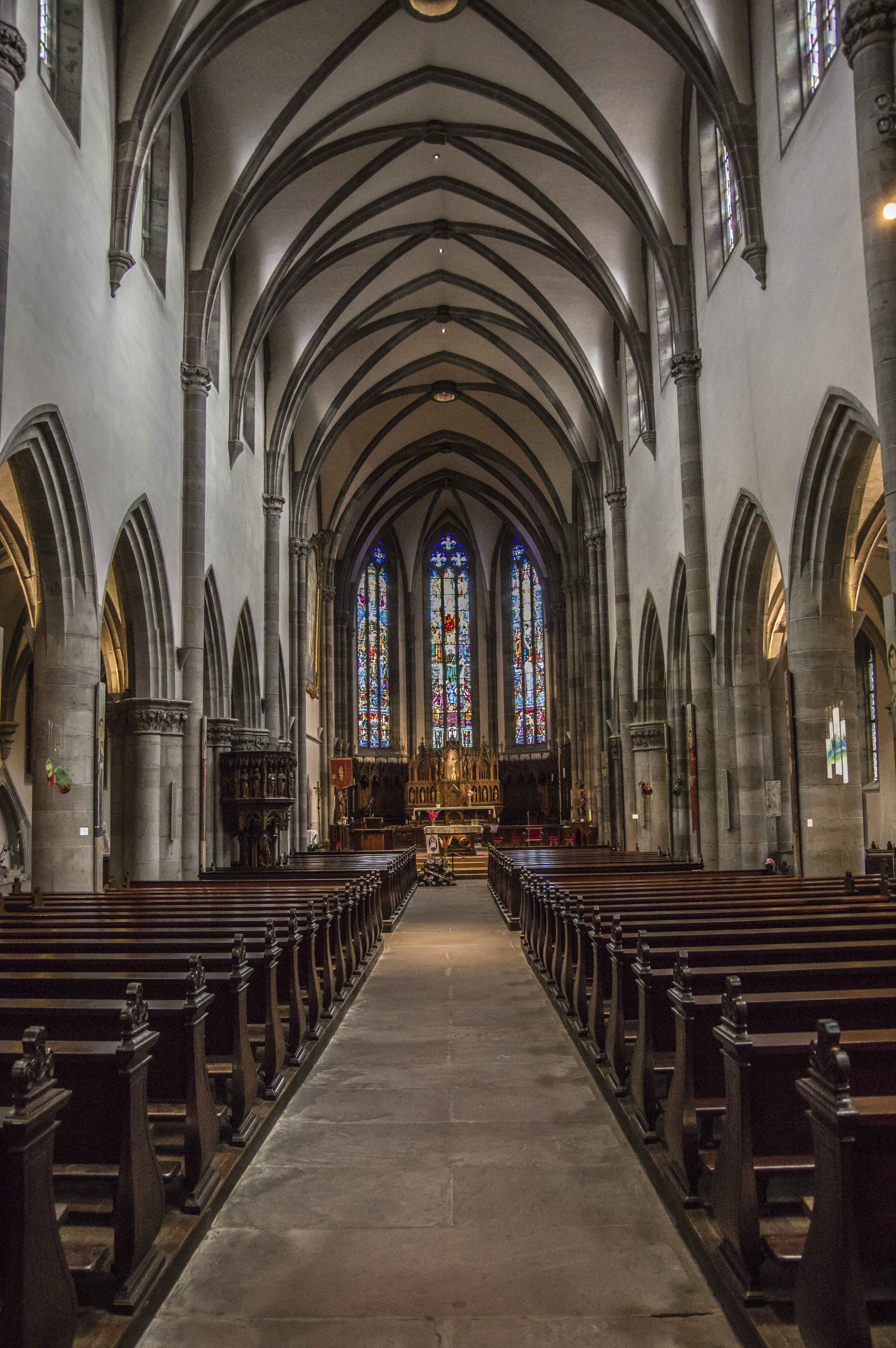 Église Saint-Grégoire de Ribeauvillé